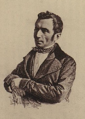 Porträt des Dr. Karl Friedrich Vierordt; Direktor des Karlsruher Lyceums; Zeichnung nach einer Lithographie von 1849